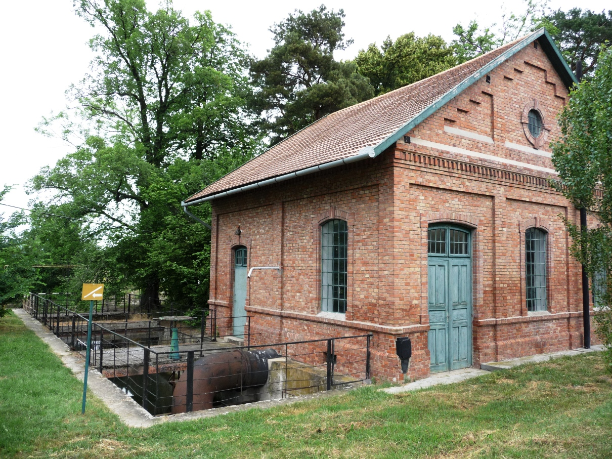 A Peresi tájház épülete, az 1904-ben épített szivattyútelep (Mezőtúr)